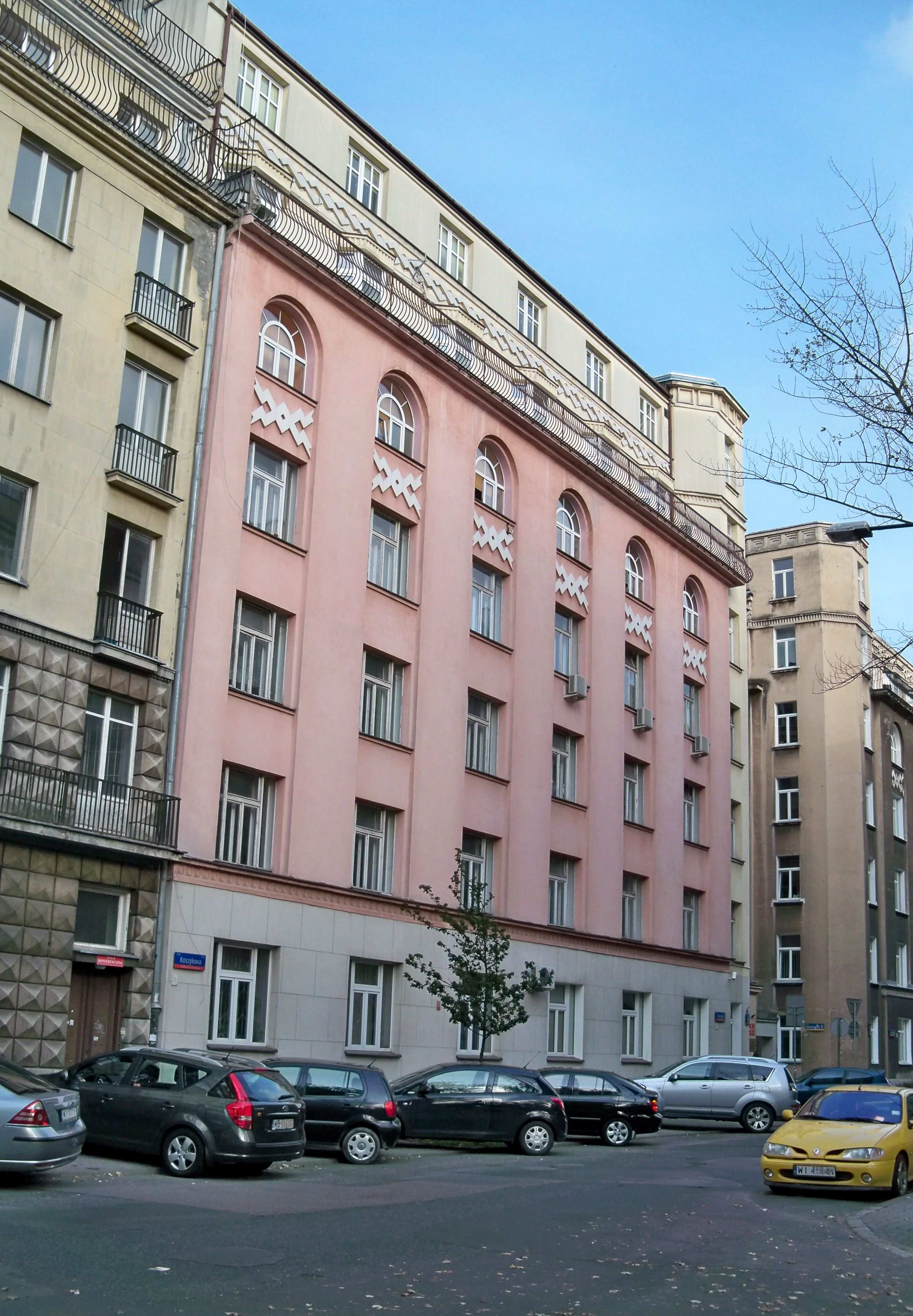 Budynek przy ul. Koszykowej 6a (róg Św. Teresy) w Warszawie. Regionalna Izba Obrachunkowa i Ośrodek Studiów Wschodnich im. Marka Karpia. Dawny blok spółdzielni mieszkaniowej Idealna. Architekt: Adolf Inatowicz-Łubiański